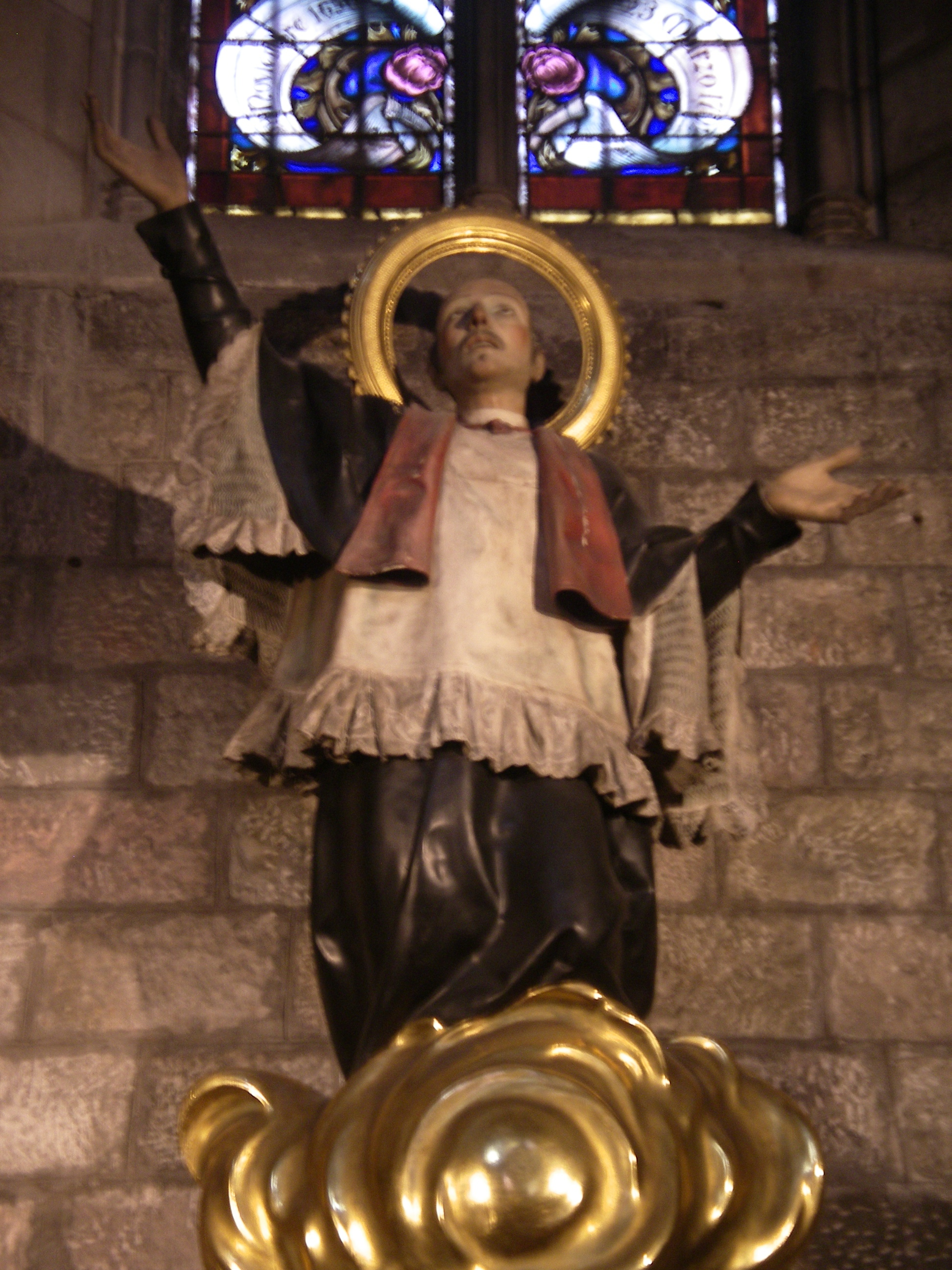 Escultura de Sant Josep Oriol per Ramon Amadeu (final s. XVIII), a una capella de l'Església del Pi de Barcelona